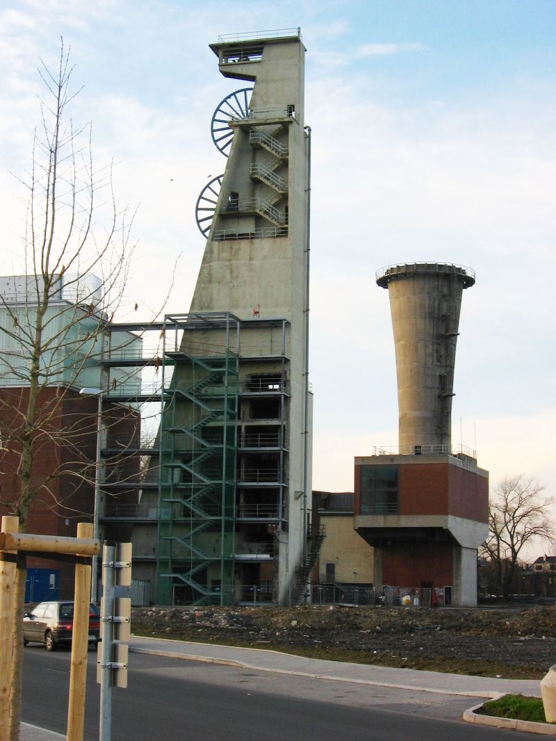 Schacht 4 der Zeche Consolidation (Gelsenkirchen) eigenes Foto